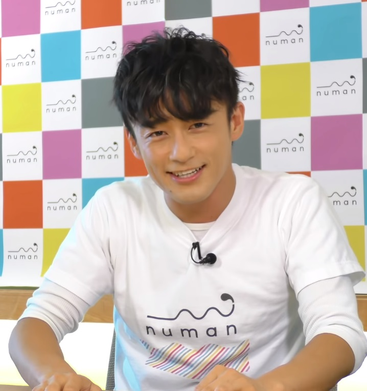 五十嵐雅（『ぬまてれ☆』第3回より）